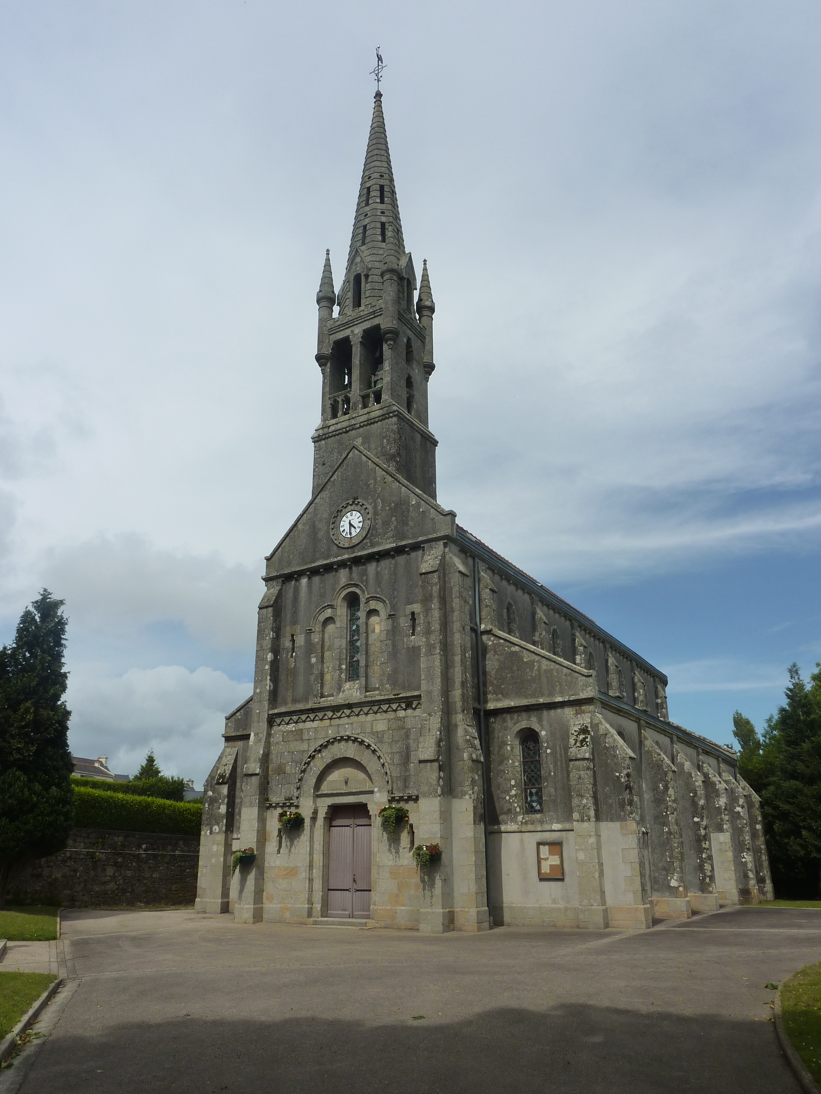 La Forest-Landerneau : l'église paroissiale de Saint-Ténénan